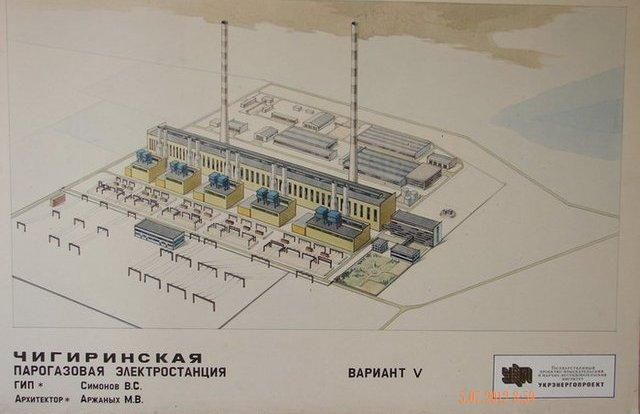 Чигиринская ПГЭС